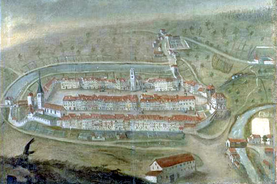 Ortsansicht von Frauenfeld vor dem Brand von 1771; aus der Vogelschau von Nordwesten. Öl auf Leinwand; 1771. 50,8 cm x 72,4 cm. Schweizerisches Landesmuseum, Zürich